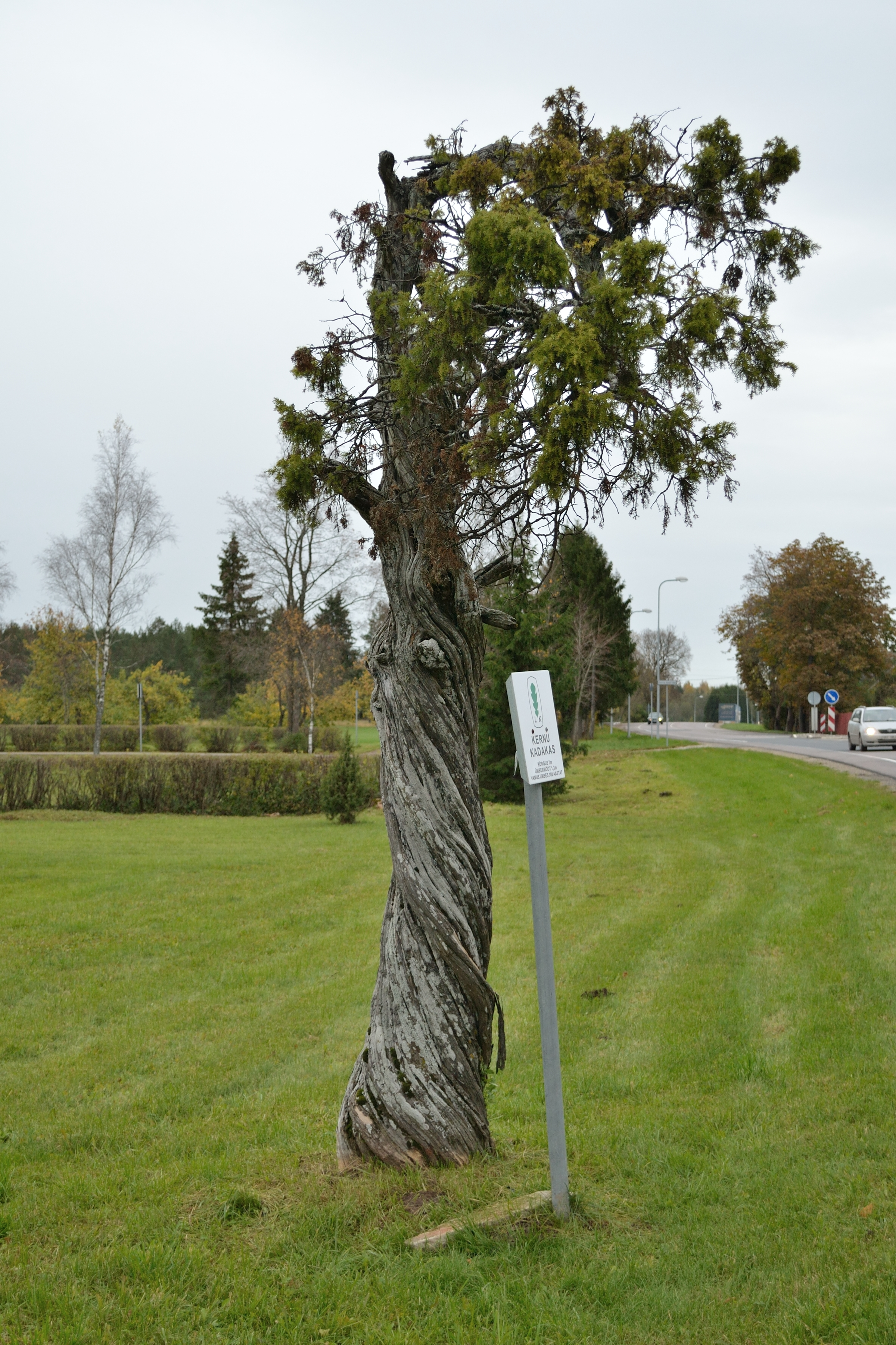 Kernu kadakas